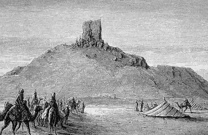 Engraving of the ruins Birs Nimrud. "The thrones and palaces of Babylon and Nineveh" by Newman, John Philip